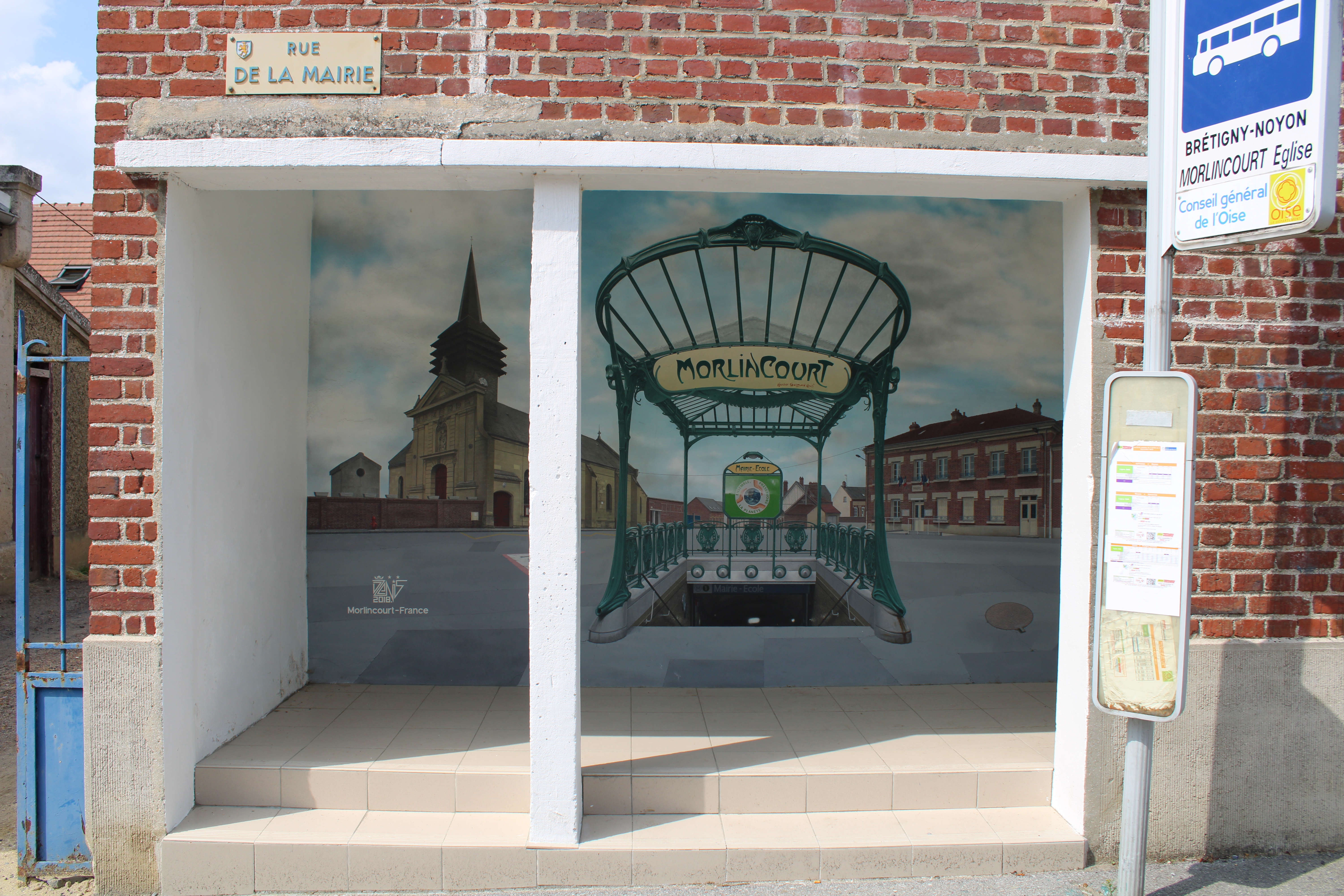 L'abris-bus décoré